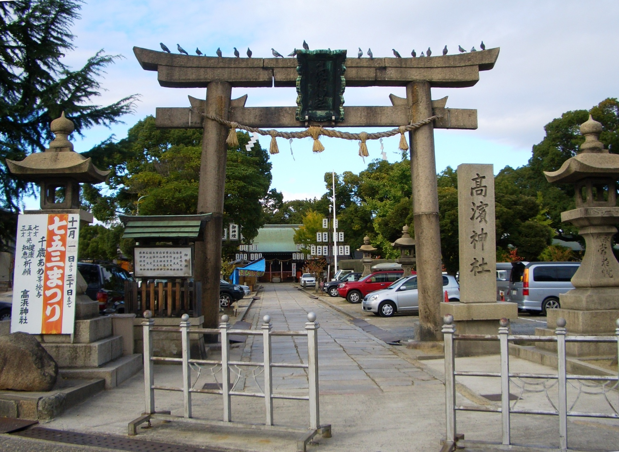 Takahama Jinja（Shinto shrine） in Suita City,Osaka,Japan